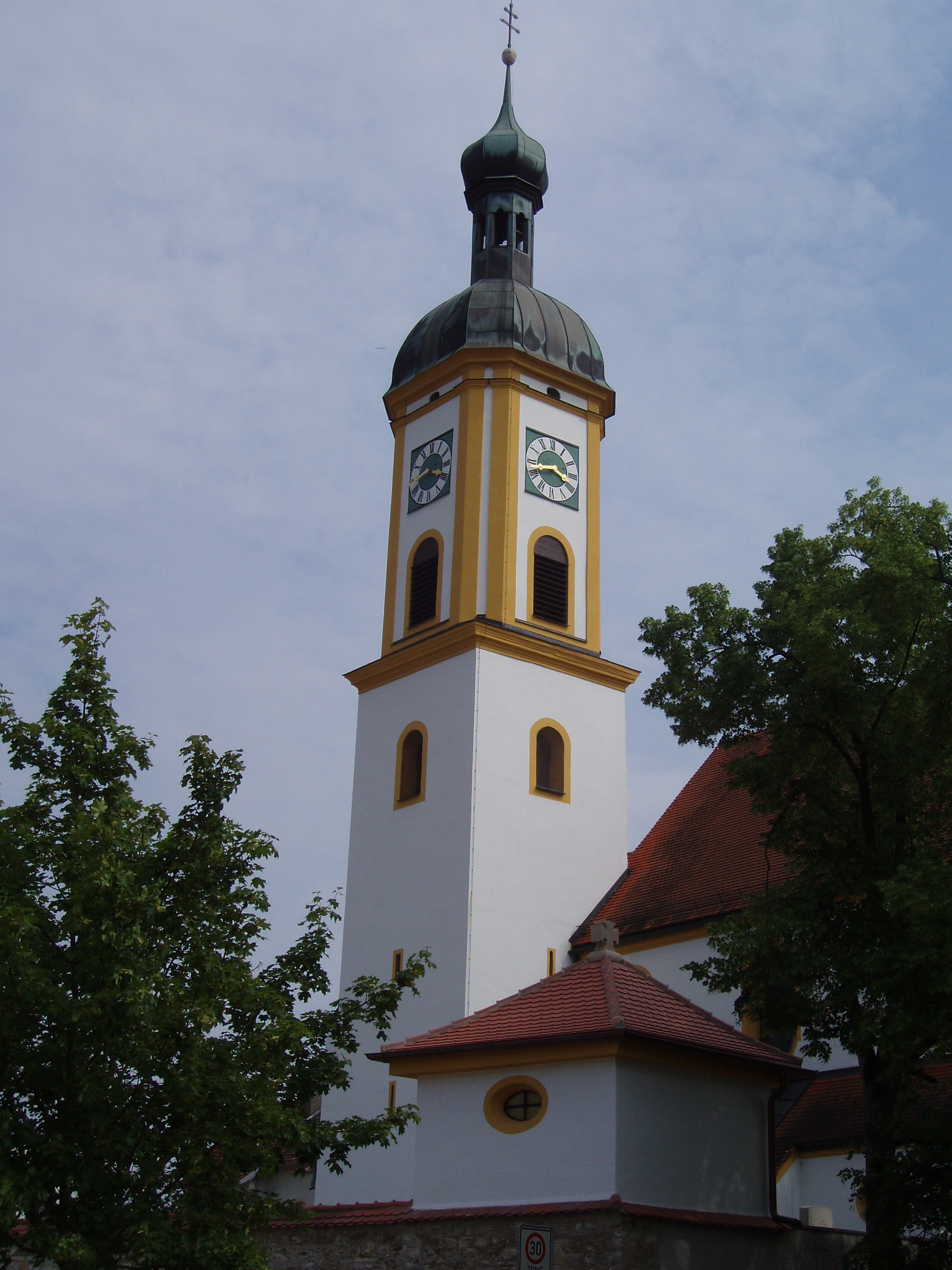 Barocker_Kirchturm_in_Buxheim_im_Landkreis_Eichstätt